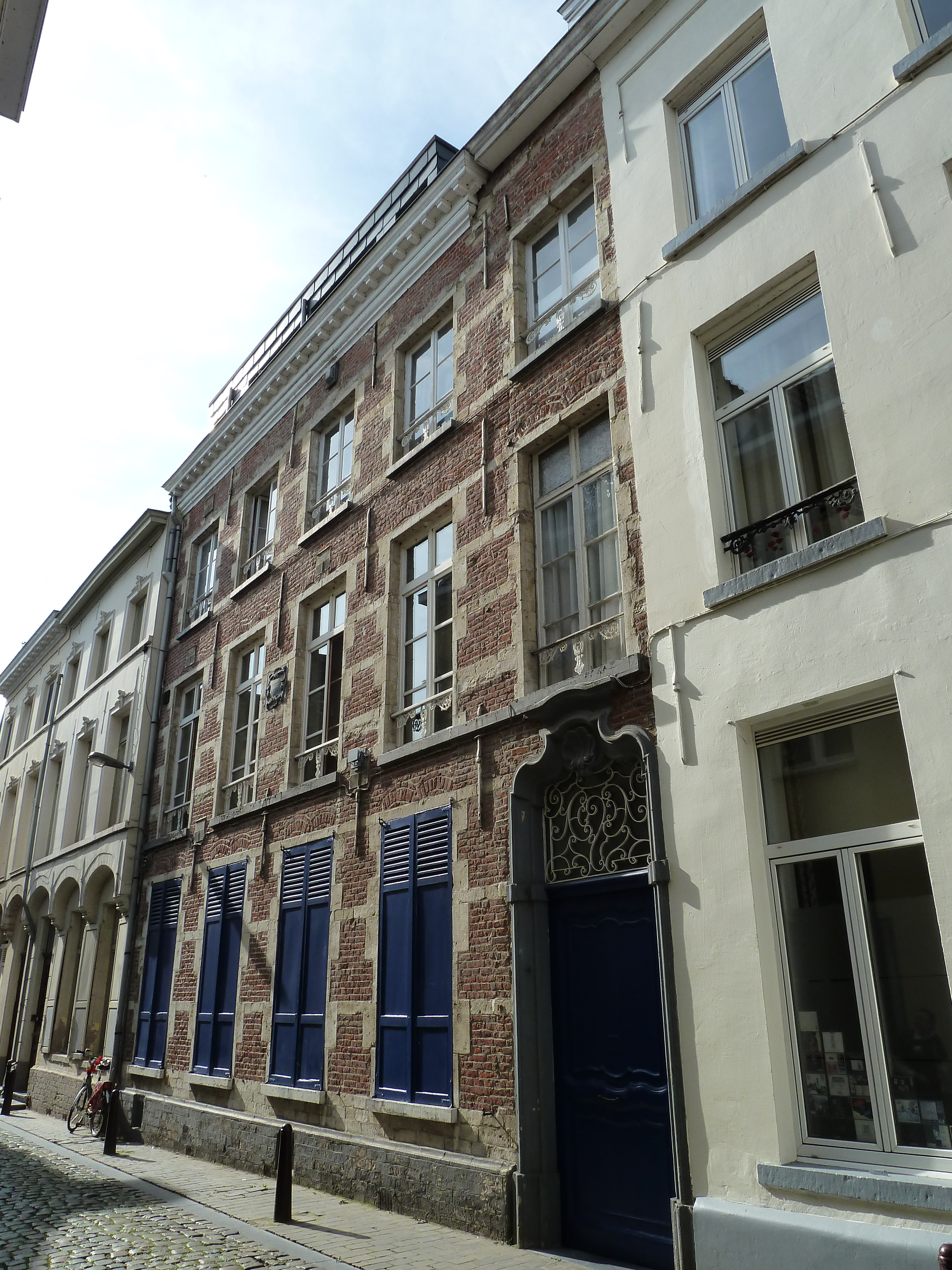 Predikherenstraat 10, Leuven, België